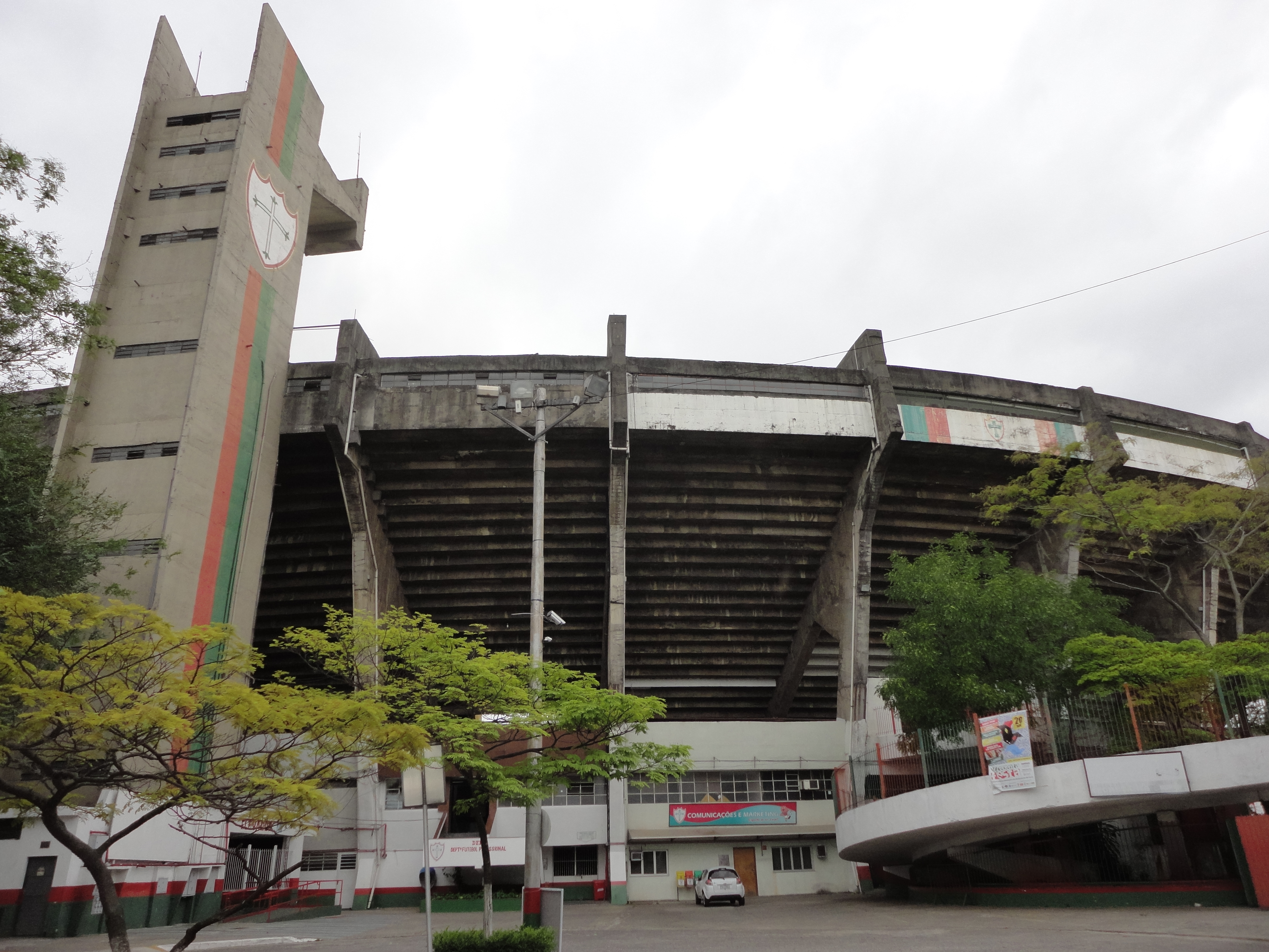 Vista externa do Canindé, em São Paulo, Brasil